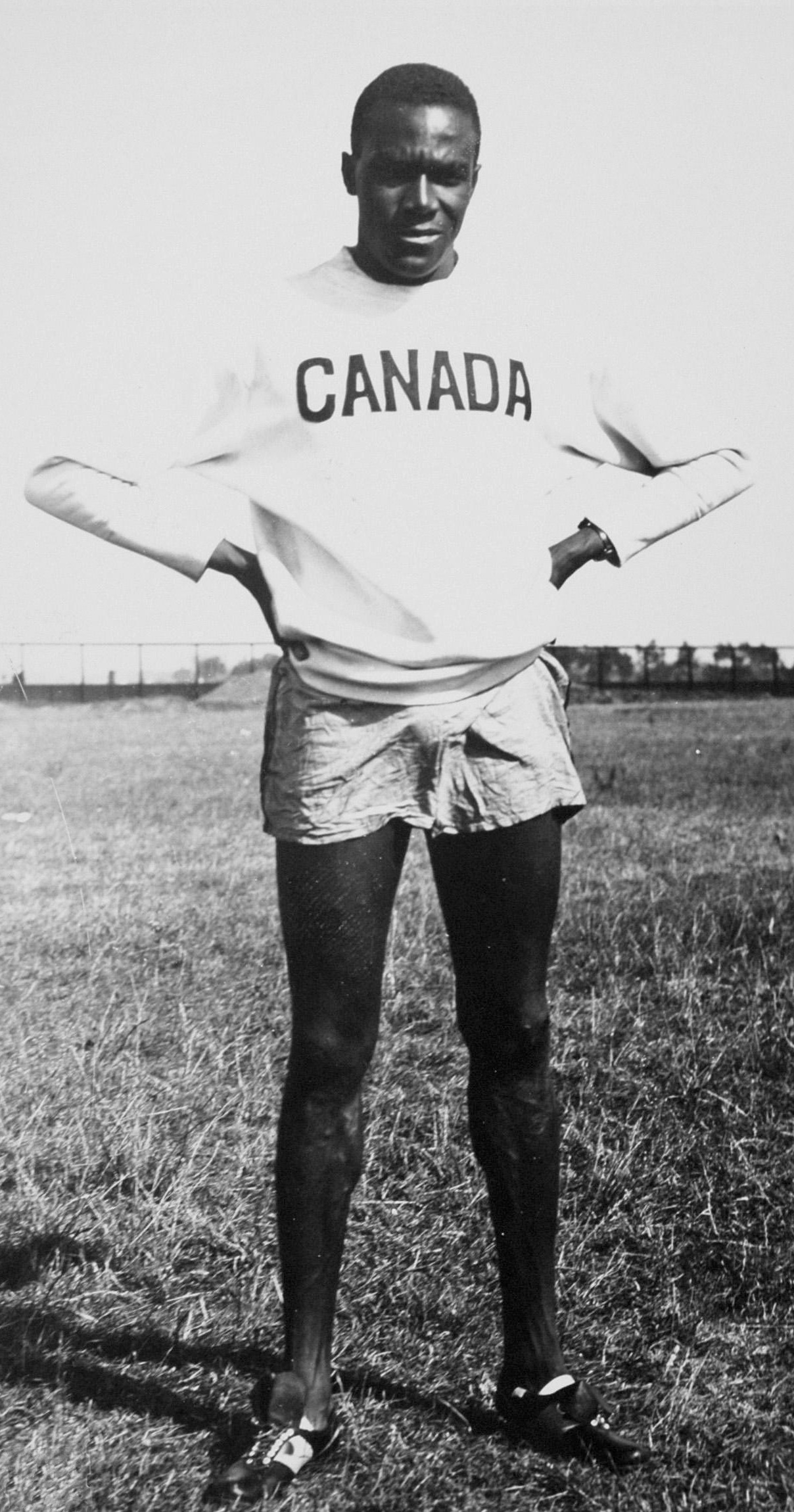 Sport. Olympische Spelen 1928 Amsterdam, Nederland : De Canadees Phil Edwards, lid van de Canadese estafetteploeg 4x400 m, die brons won.